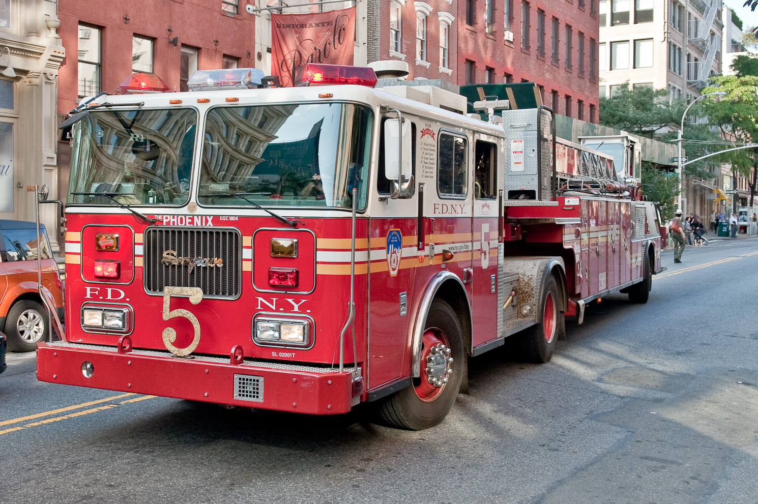 NYFD Hook and Ladder No. 5